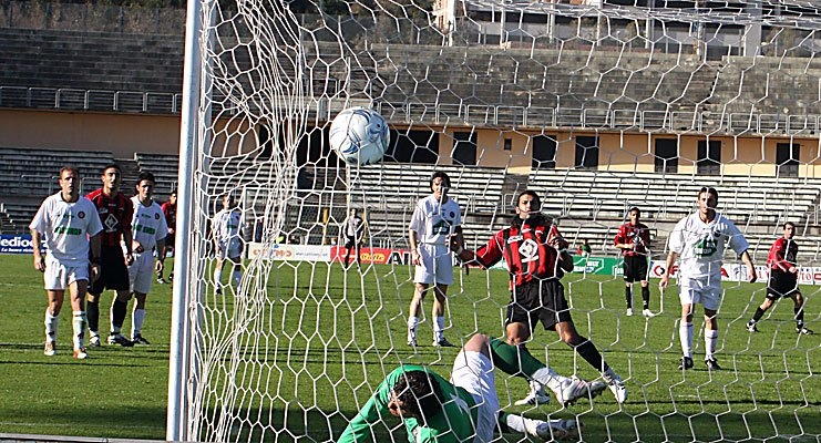 A goal